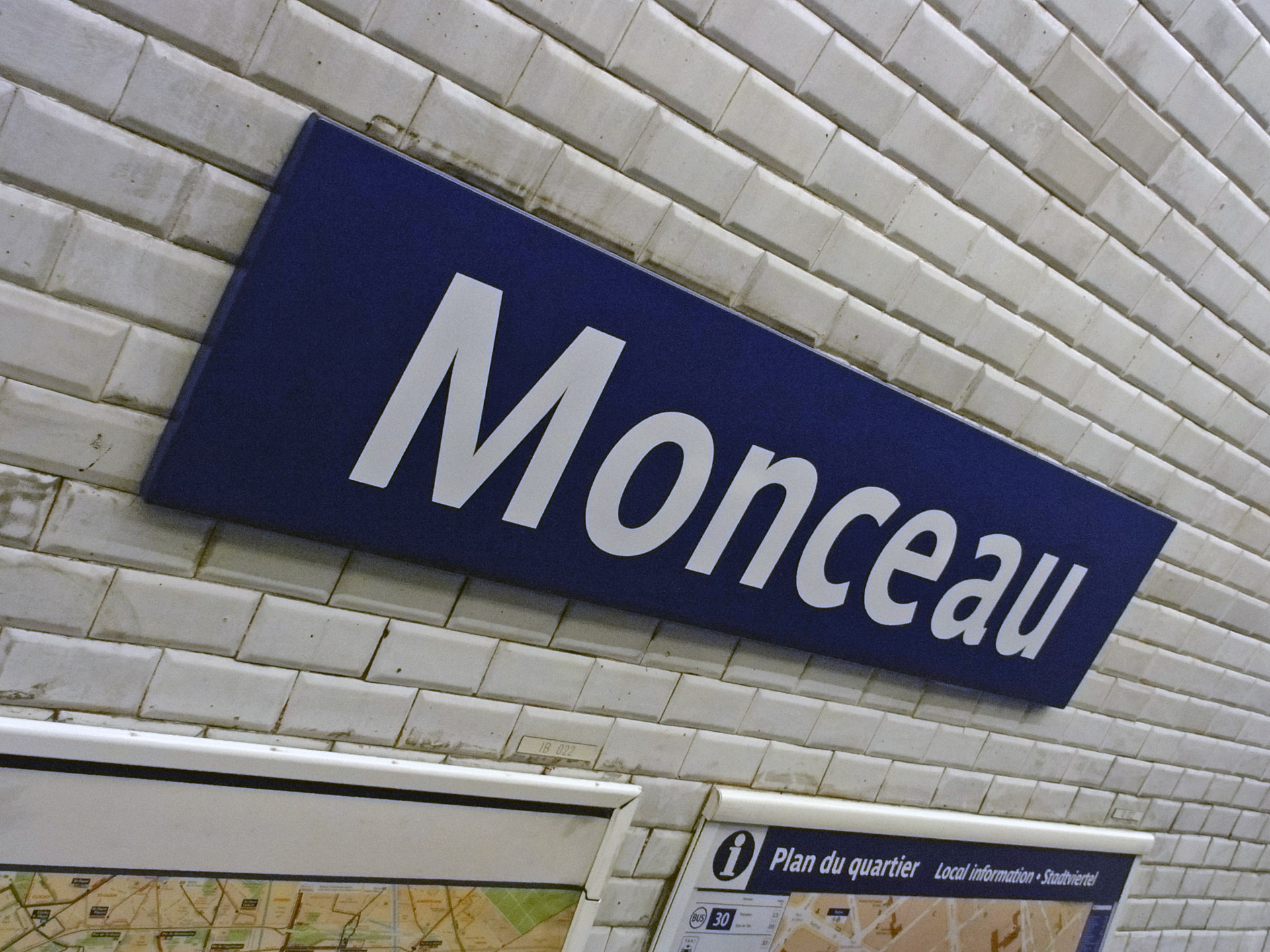 Station Monceau de la ligne 2 du métro de Paris, France.